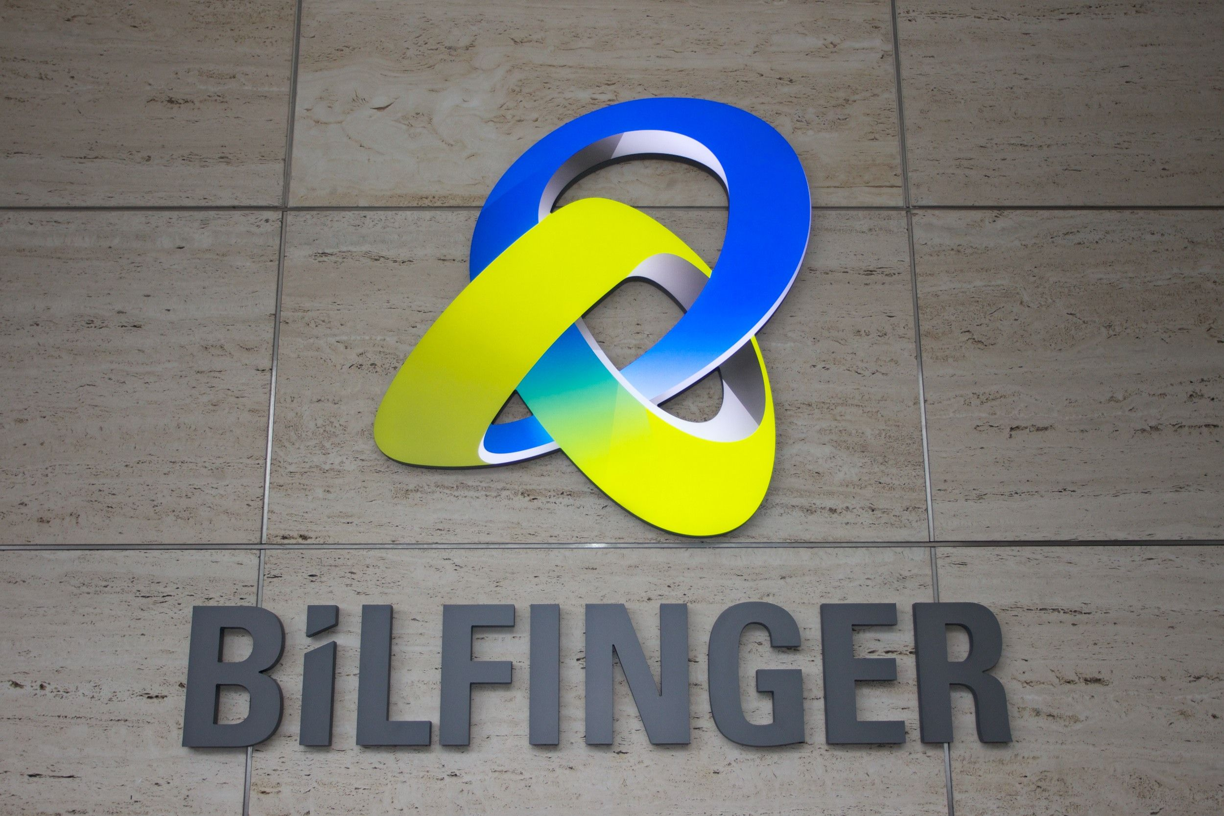 Brand Day, Logo am Gebäude der Mannheimer Zentrale